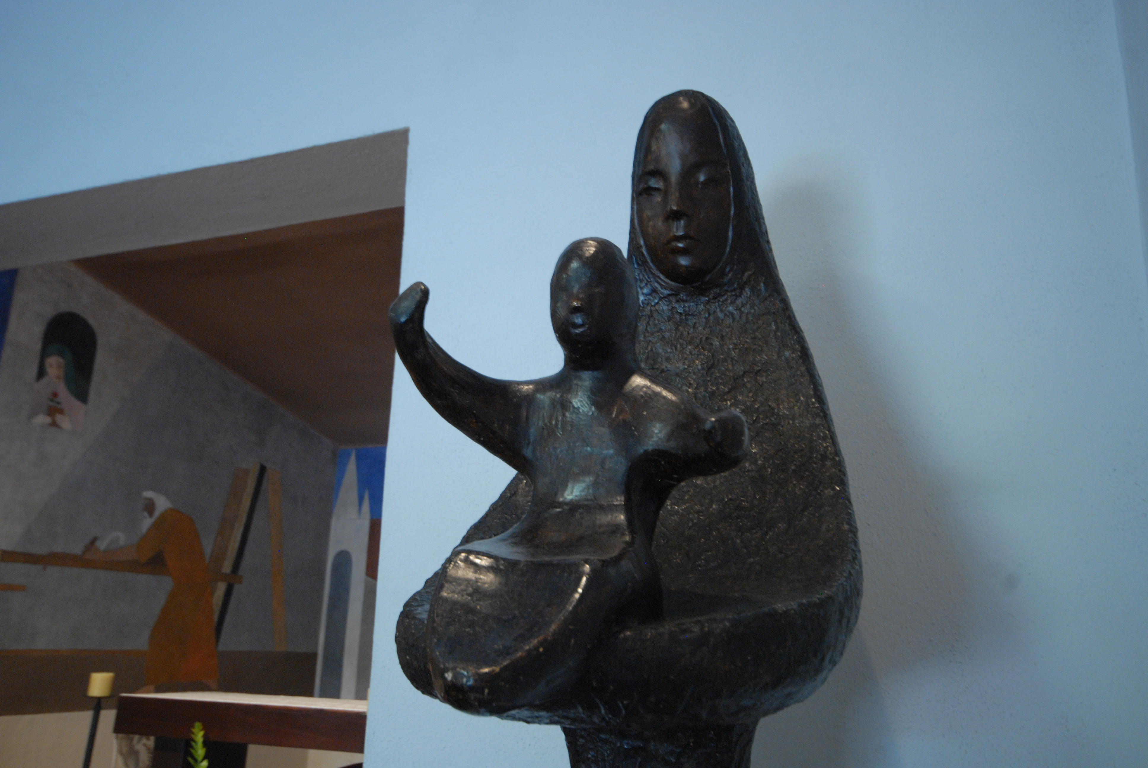 Detalhe de escultura de Nossa Senhora com Menino Jesus, na Capela do Cristo Operário